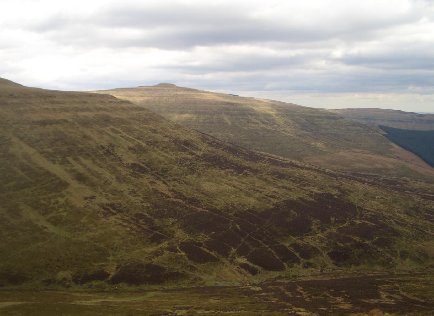 Pen y Gadair Fawr with Waun Fach (left)